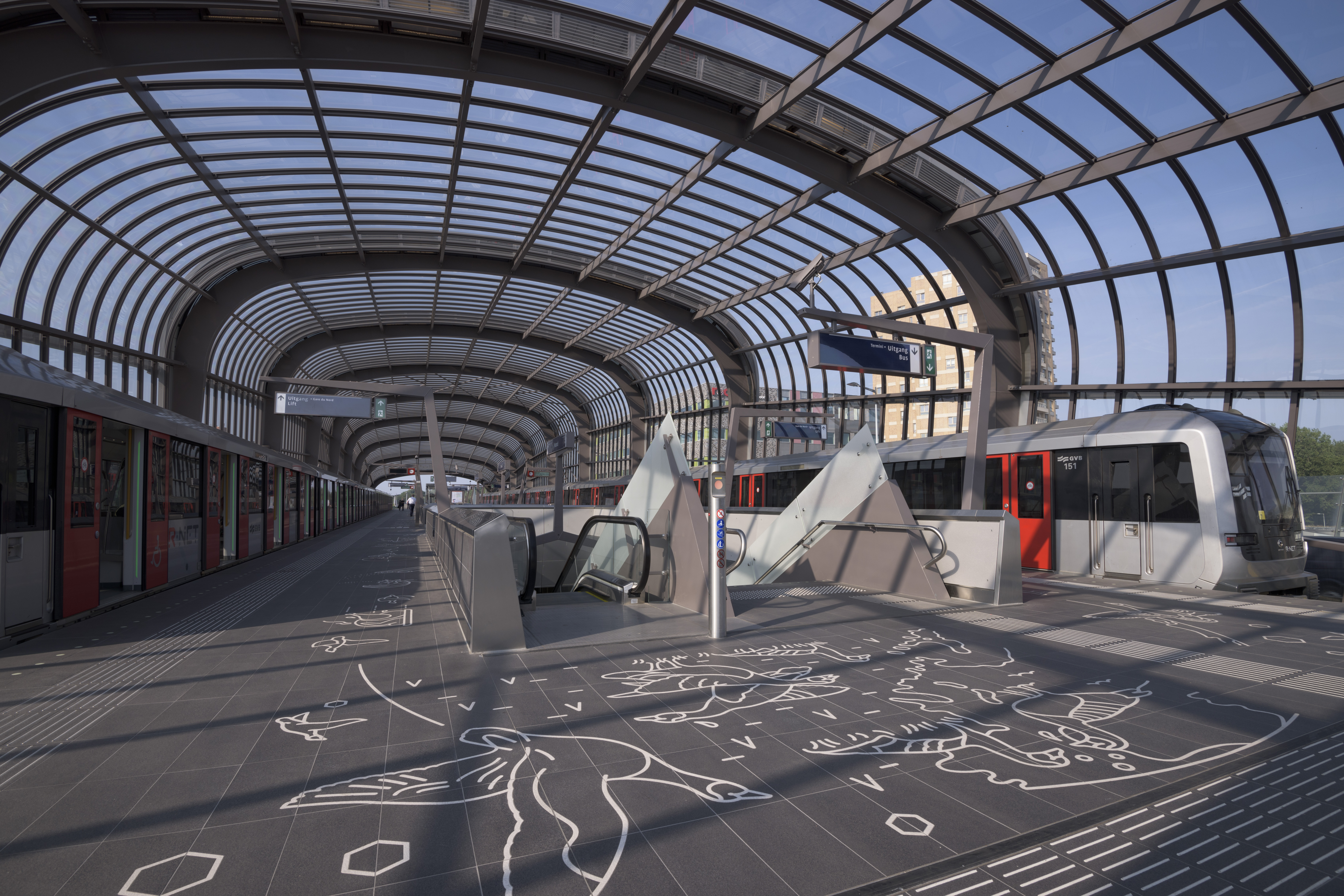 Metrostation Noord van de NoordZuid lijn.